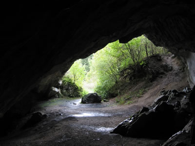 Blick aus der Kulturhöhle Hohler Stein im Lörmecketal bei Rüthen-Kallenhardt.